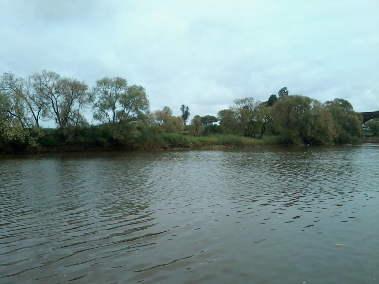 पंचगंगा नदी